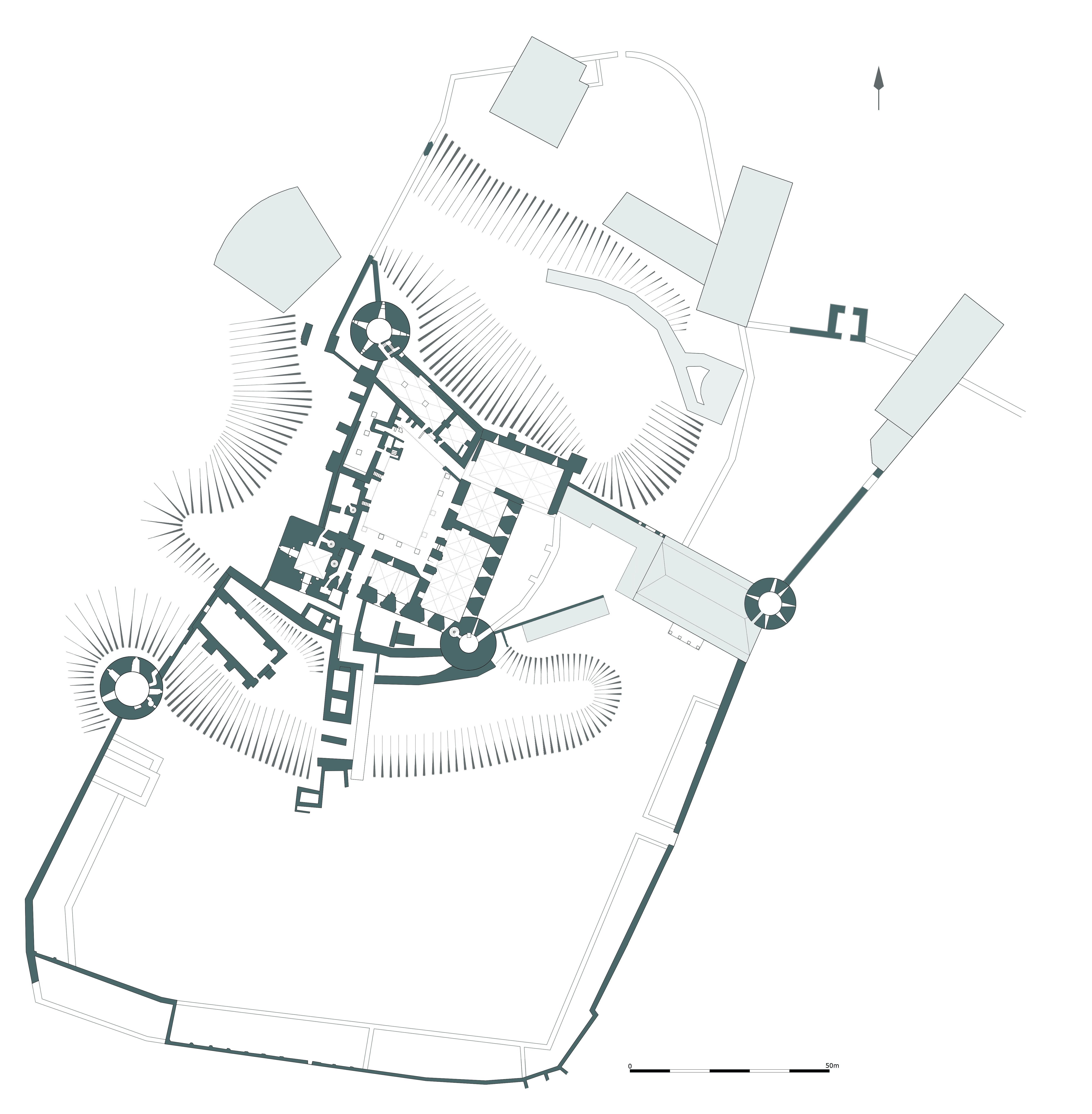 Cēsu pils plāns